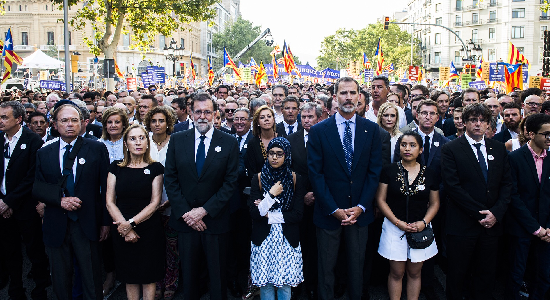 Por encima de las diferencias, debemos estar unidos para plantar cara al terrorismo. #NoTengoMiedo #NoTincPor